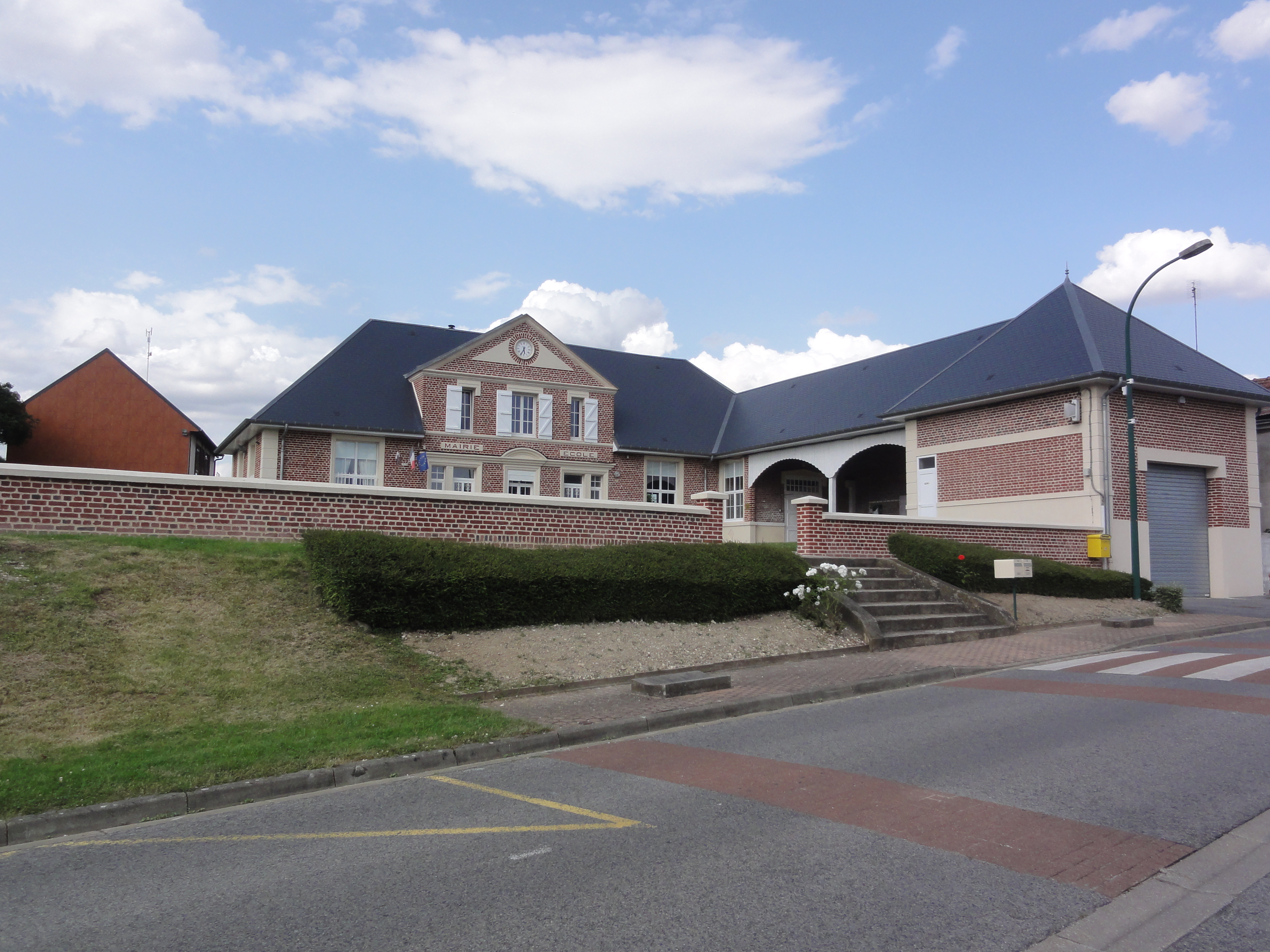 Castres (Aisne) mairie-école